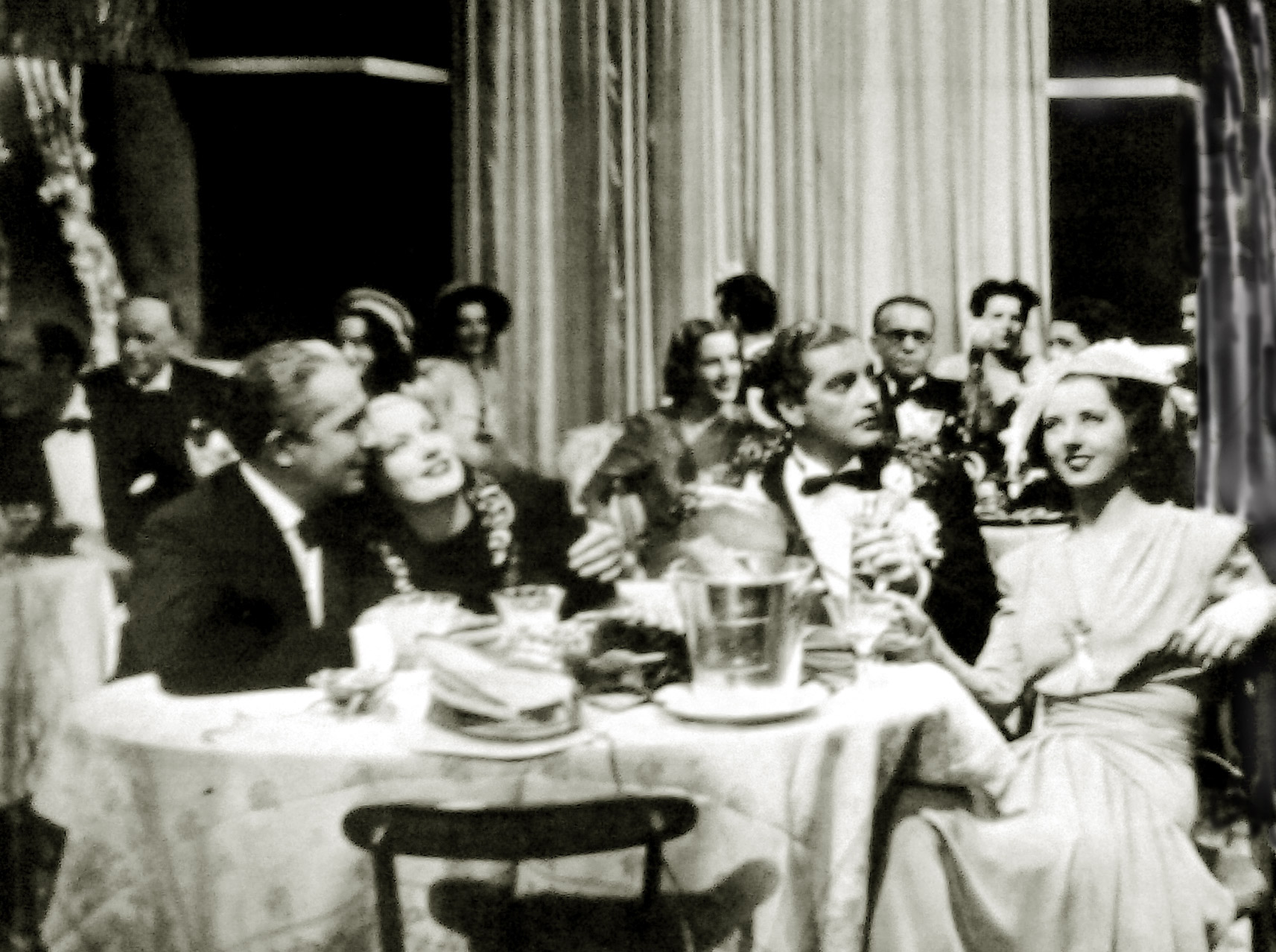 Luigi Pavese, Isa Miranda, Claudio Gora e Carla Martinelli in "E' caduta una donna" (Guarini, 1941)